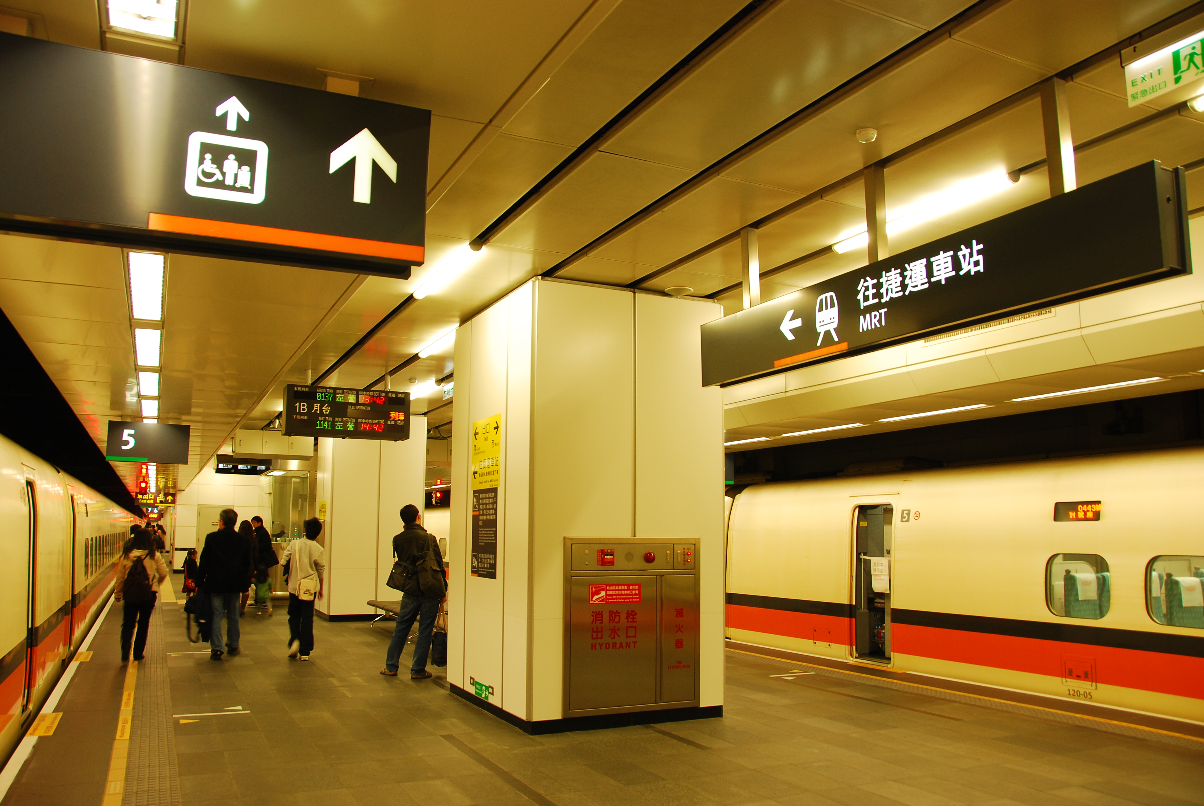 中文（台灣）: 高鐵臺北站1B月臺。 Bân-lâm-gú: Ko-thih Tâi-pak-tsām 1B gue̍h-tâi. 高鐵臺北站1B月臺。